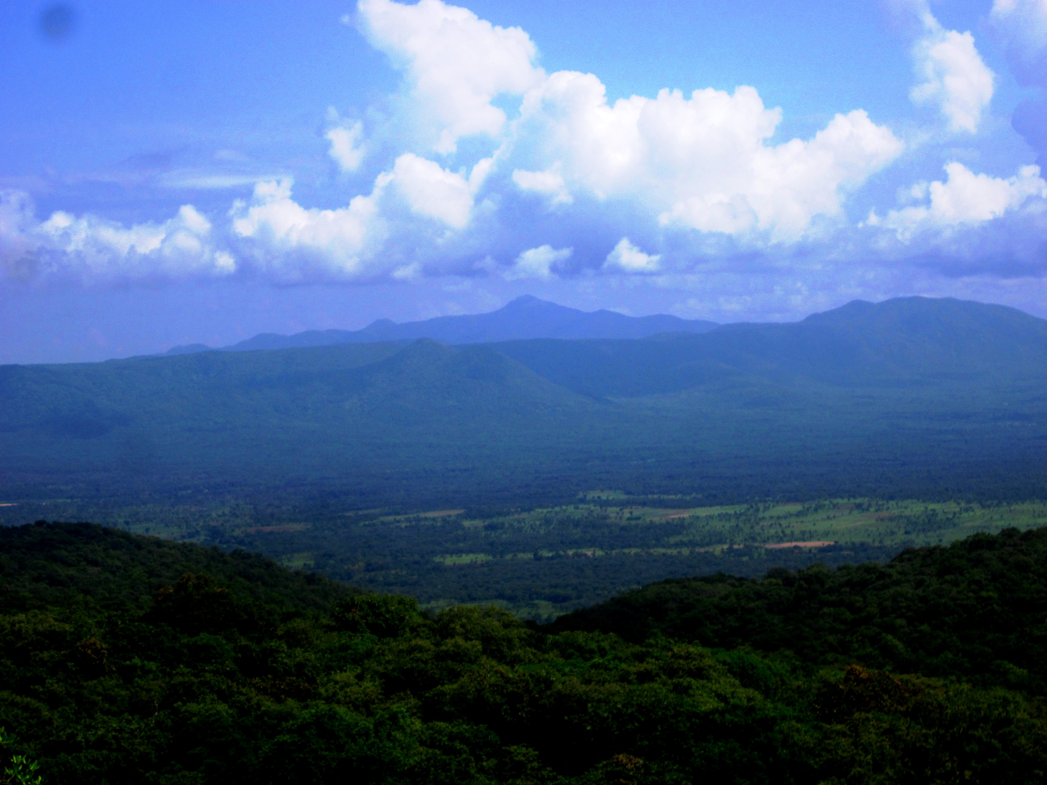 Vue paronamique du site ecotouristique de la falaise de N'Gaoundéré. Localisation : Vina, Adamoua